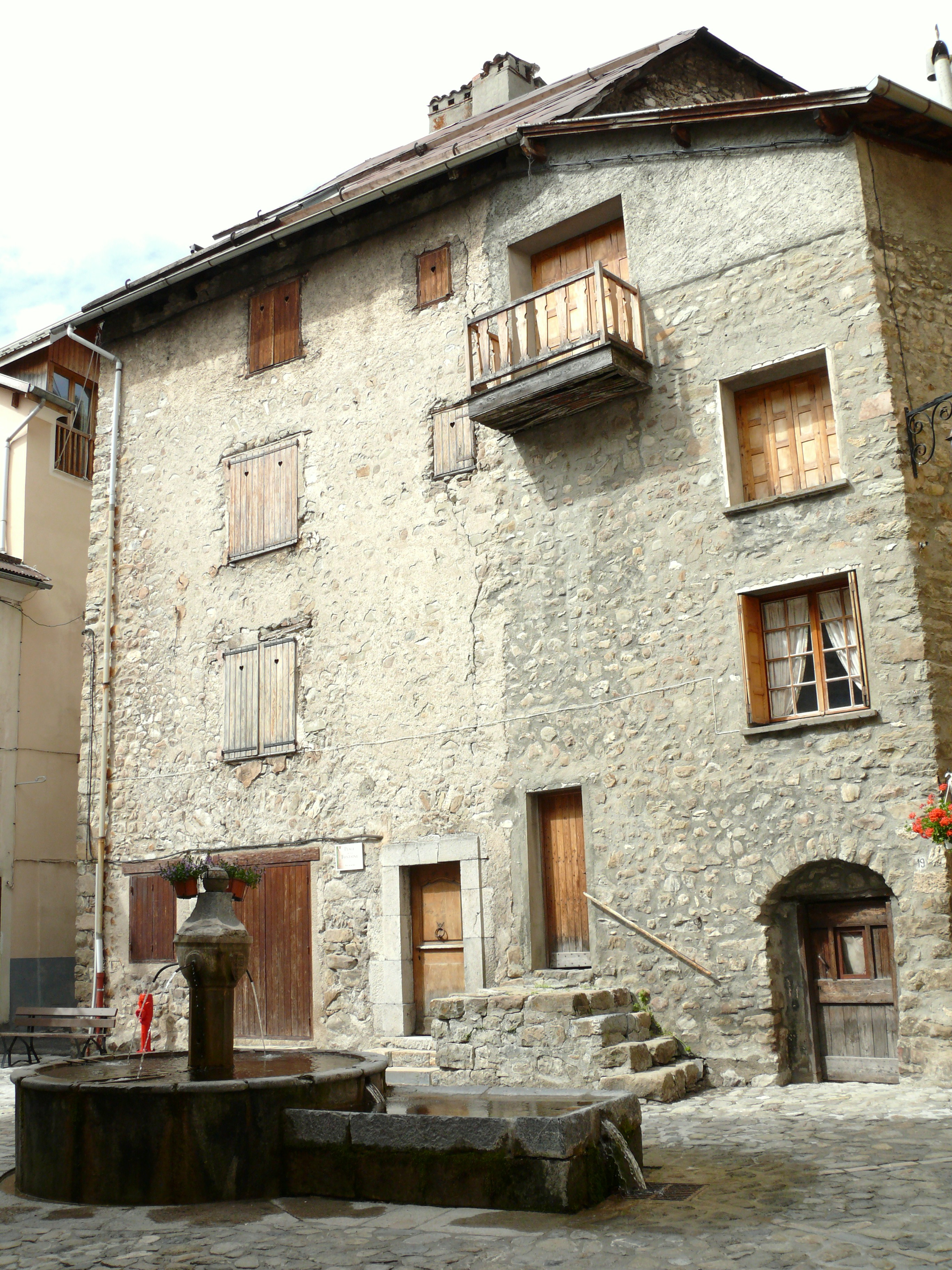 Colmars - La Bugade - Le Bassin-Bas de 1635 et la Fontaine Neuve de 1803